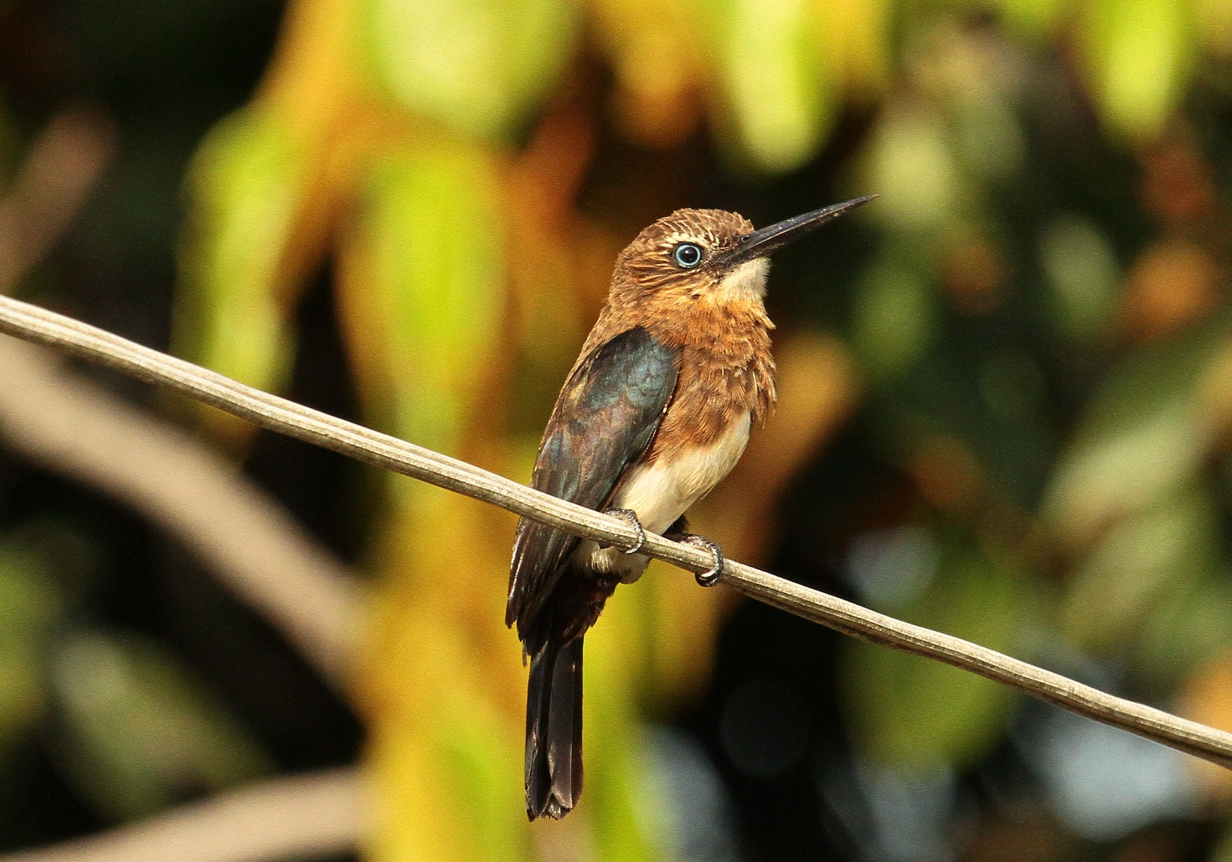 Gran Sabana, estado Bolivar, Venezuela